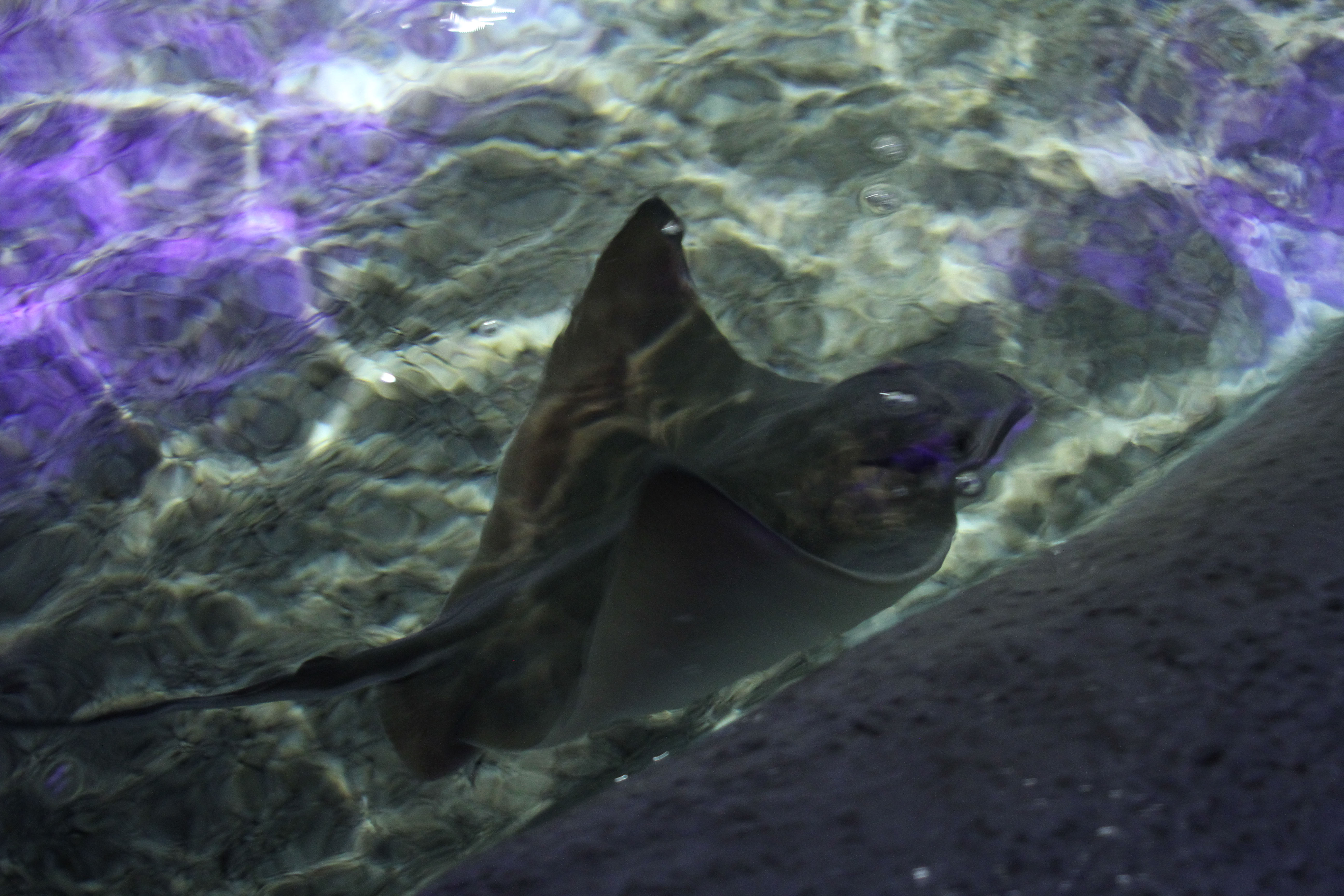 Raya Manchada sacando una de sus aletas del agua, Acuario Inbursa de la Ciudad de México, México